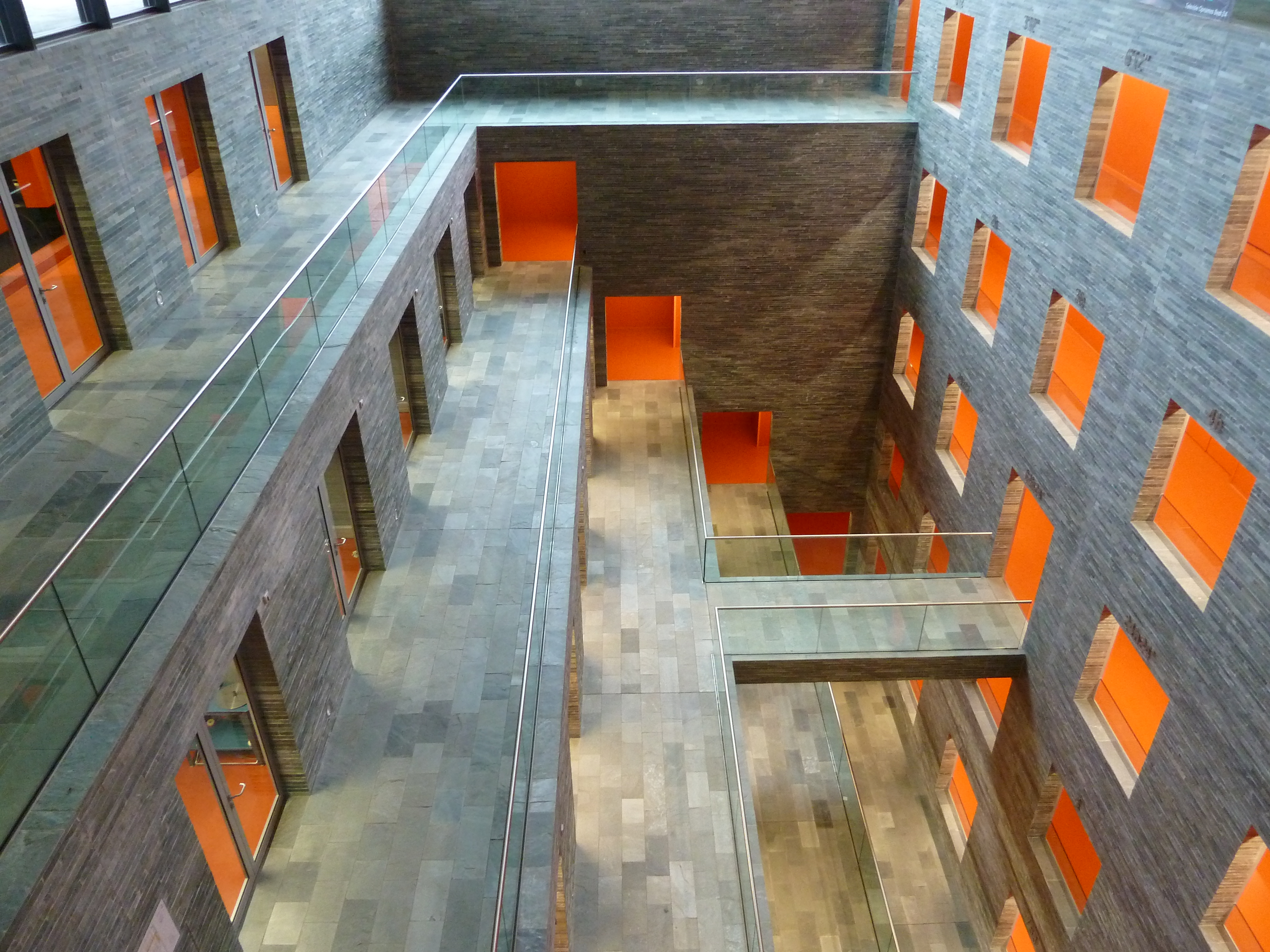 Nederlands Instituut voor Beeld en Geluid